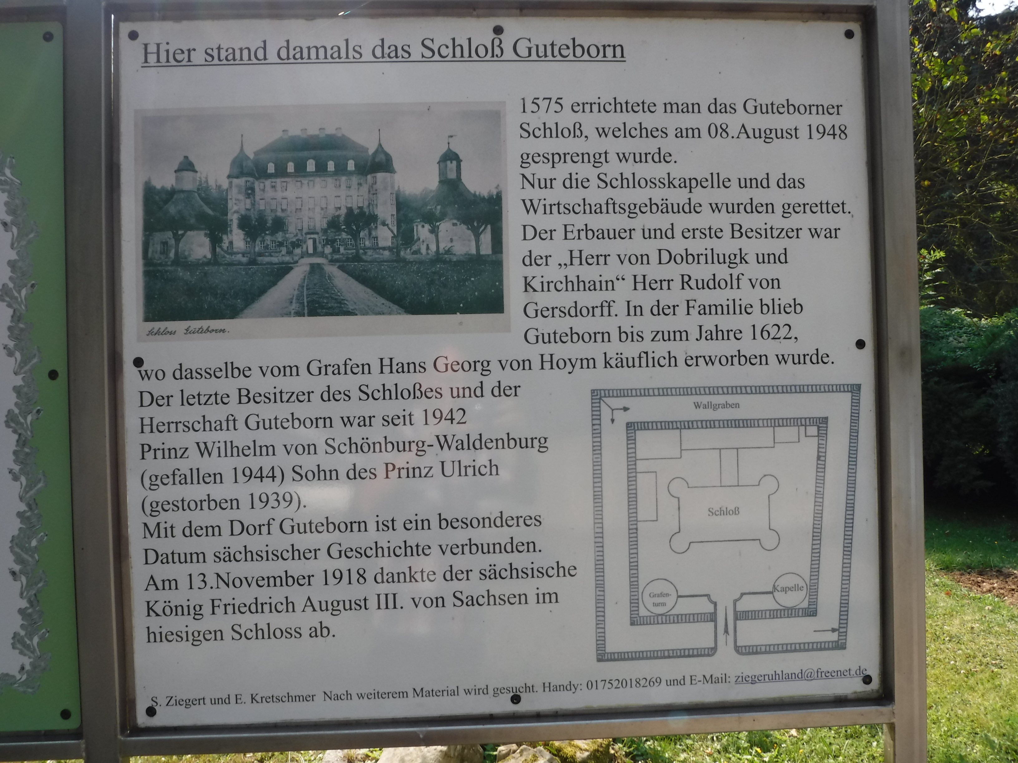 Informationstafel am ehemaligen Schloss Guteborn